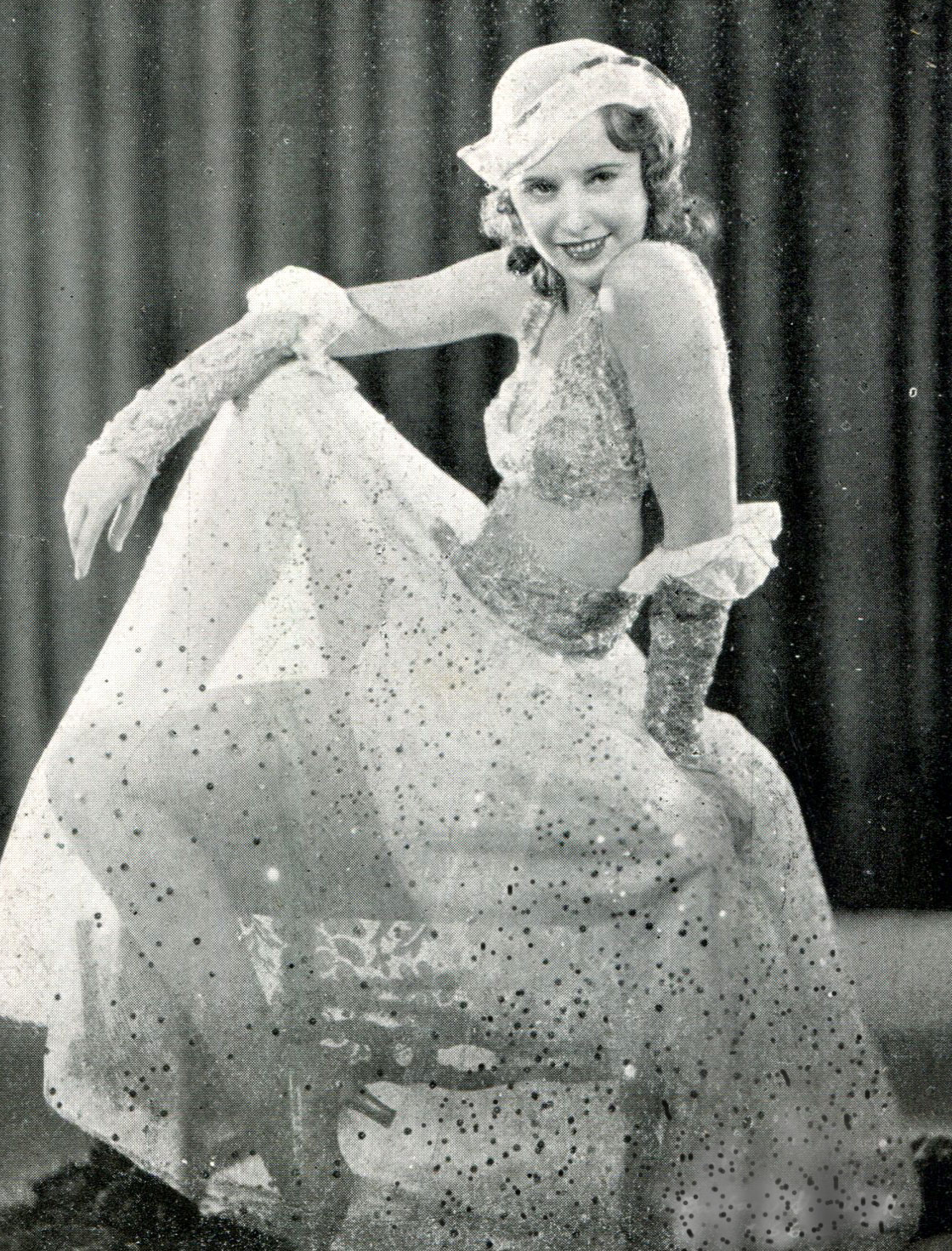 L'attrice Barbara Stanwyck in un'immagine pubblicata in Italia nel 1931